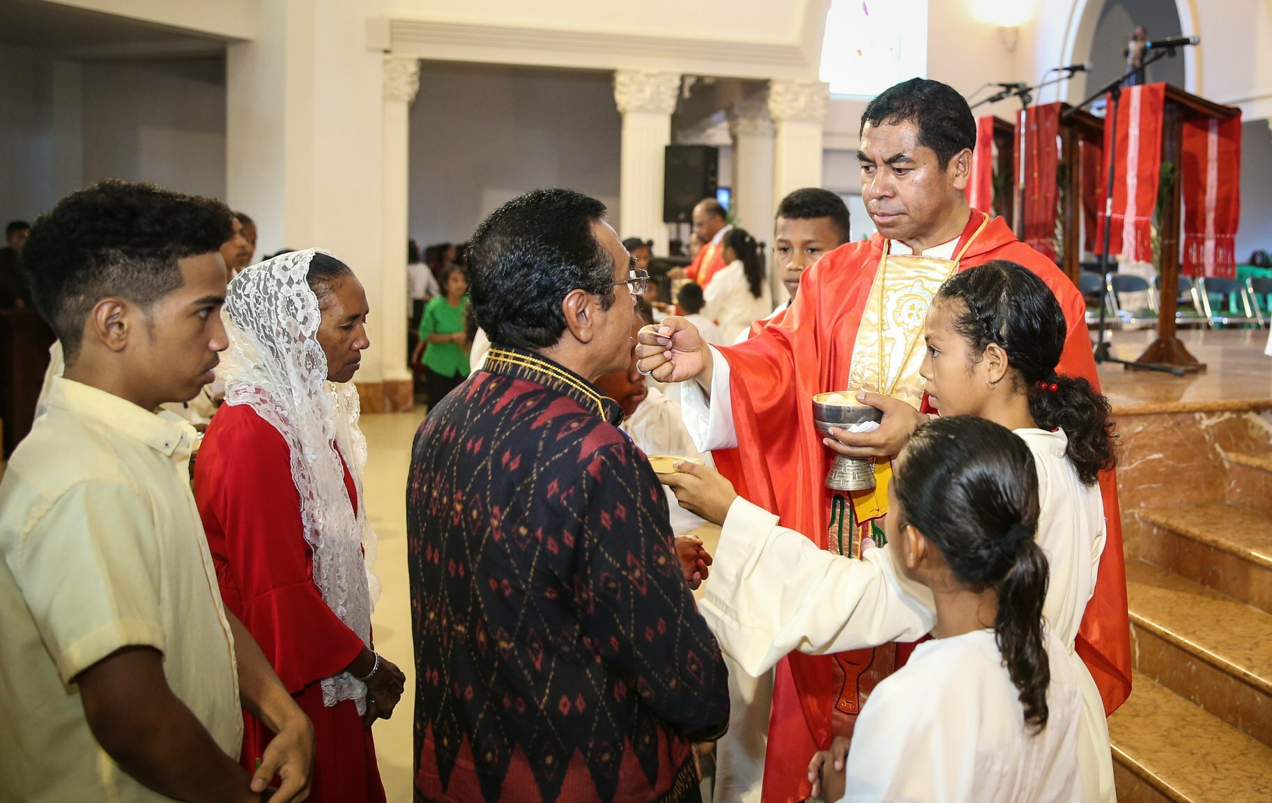 Dilis Bischof Virgílio do Carmo da Silva gibt Staatspräsident Francisco Guterres am Palmsonntag eine Hostie